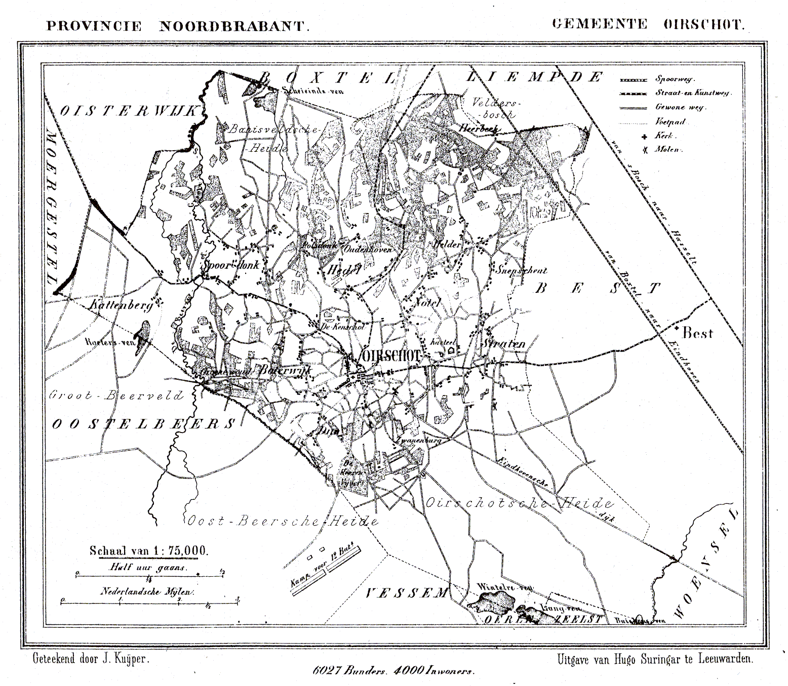 Nederland, Noord-Brabant, Gemeente Oirschot